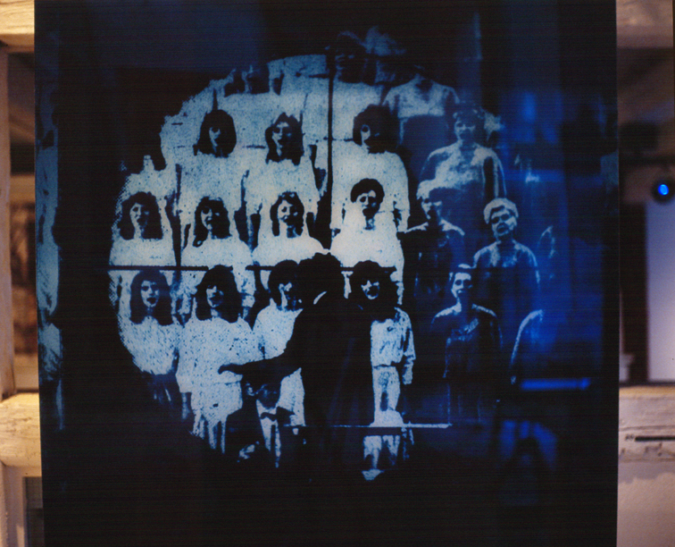 Plexiglasarbeit